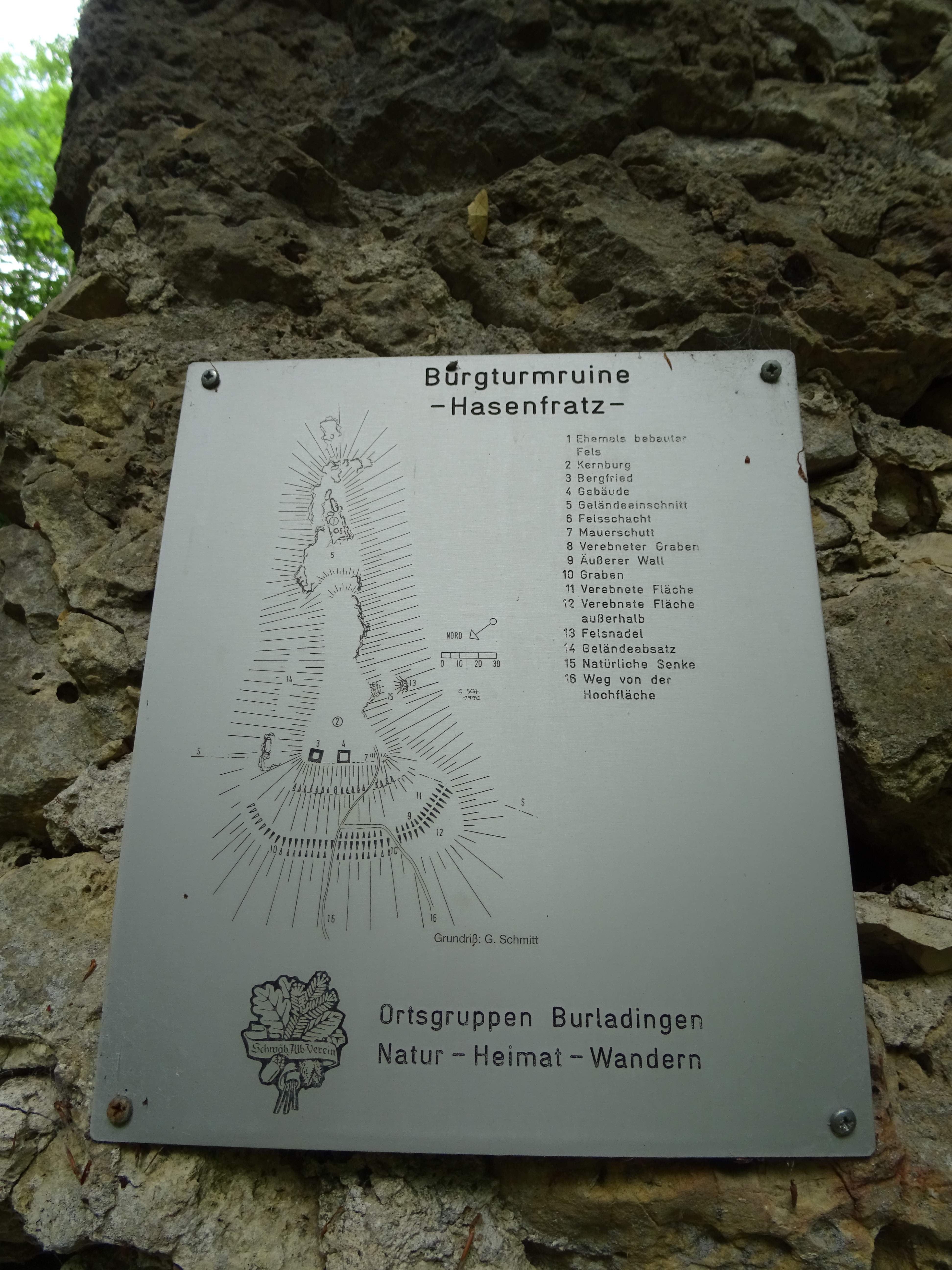 Plakette des Schwäbischen Albvereins an der Ruine Hasenfratz